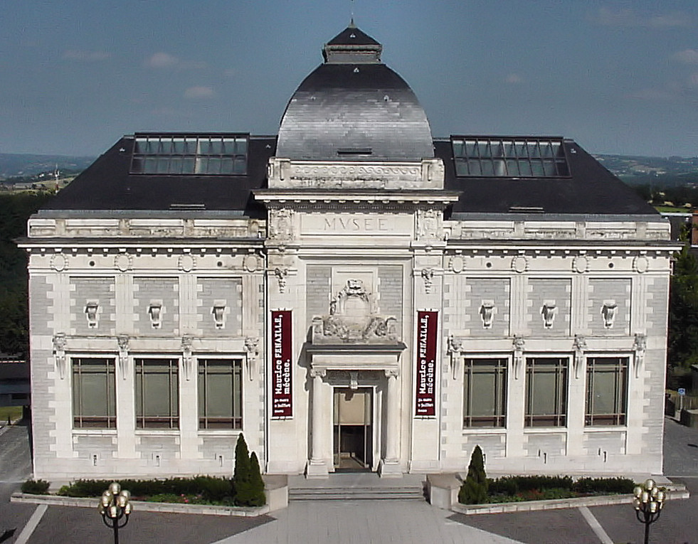 Musée Denys-Puech de Rodez, vue plongeante depuis les étages du lycée François d'Estaing en face Banderoles pour l'exposition: Maurice Fenaille, mécène (de Rodez - voir Musée Fenaille).